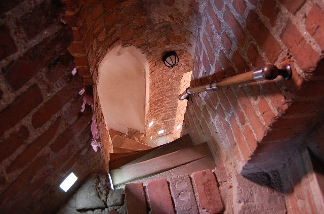 Мірскі замак. Лесвіца ў вежы